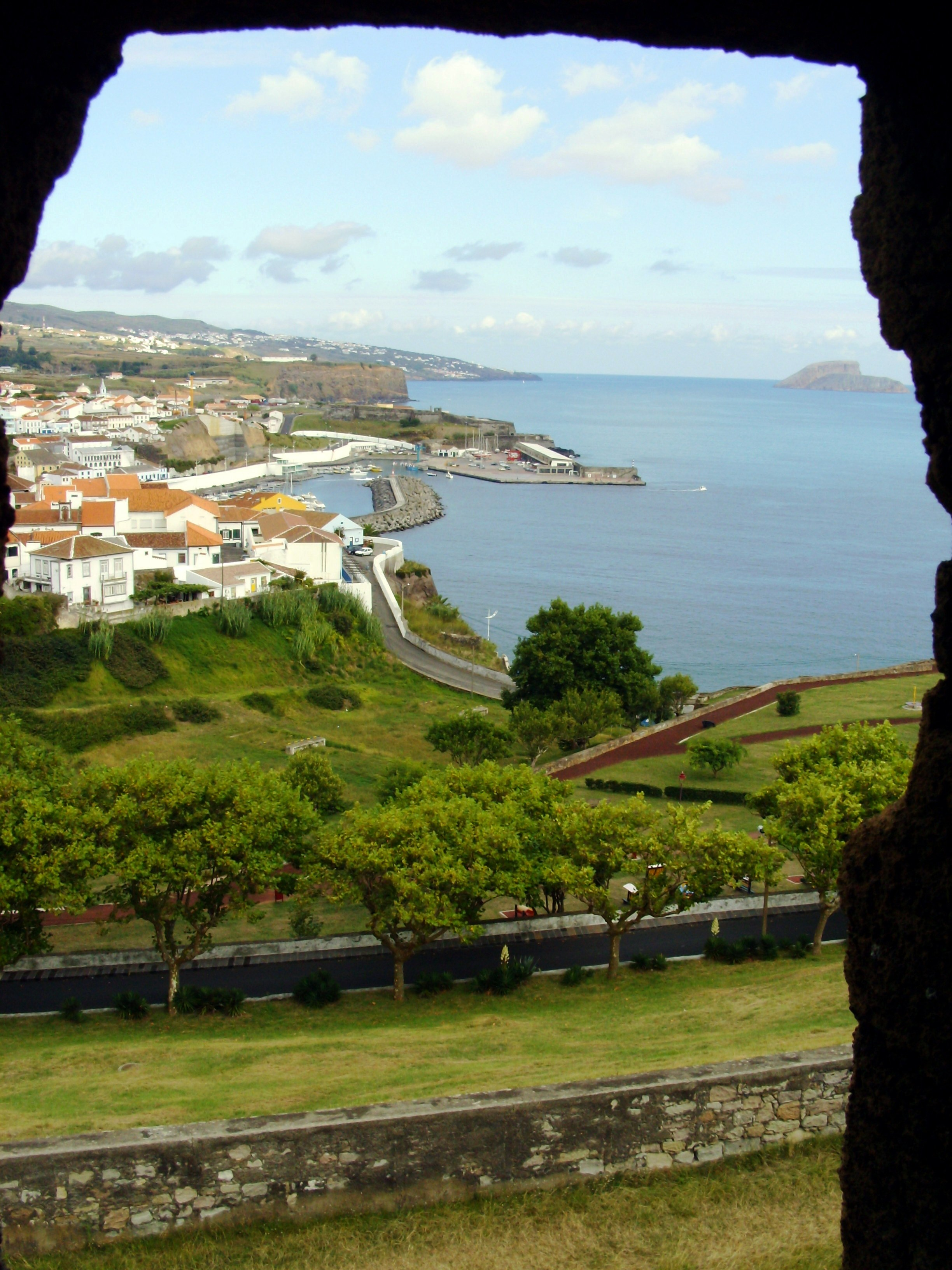 Fortaleza de São João Baptista do Monte Brasil, Angra do Heroísmo, ilha Terceira, Açores: vista da baía de Angra a partir do interior de uma guarita.